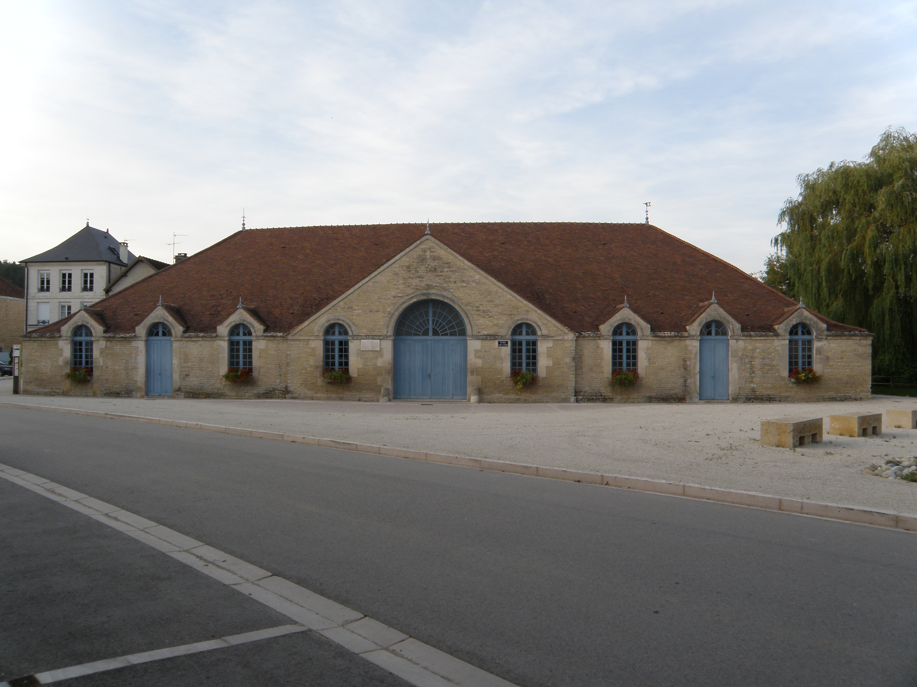 Halle de Ricey-Haut. 10340 Les Riceys